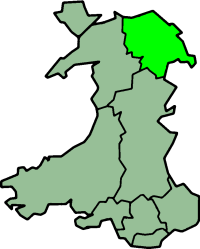 Mapa de Clwyd